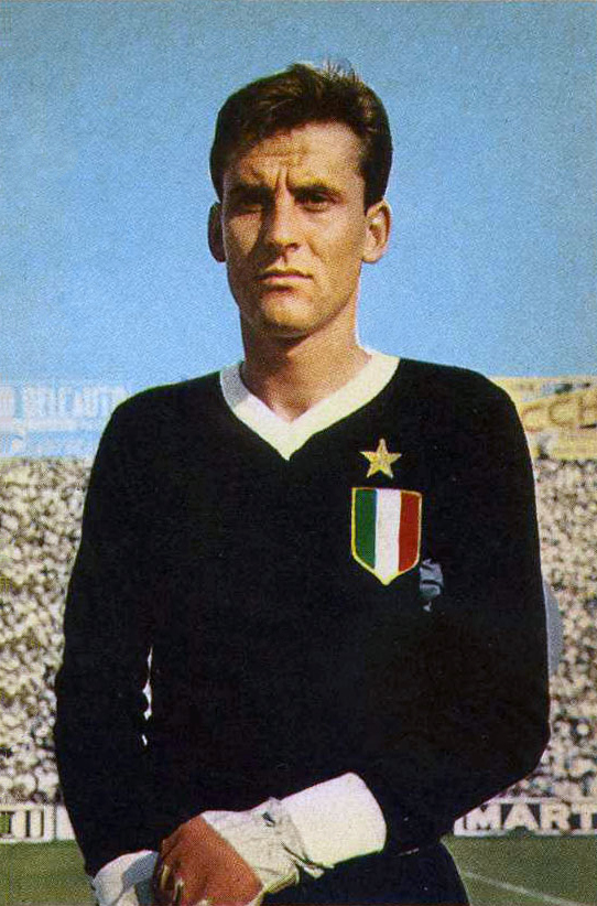 Il portiere di calcio italiano Roberto Anzolin alla Juventus F.C. nella stagione 1961-62.